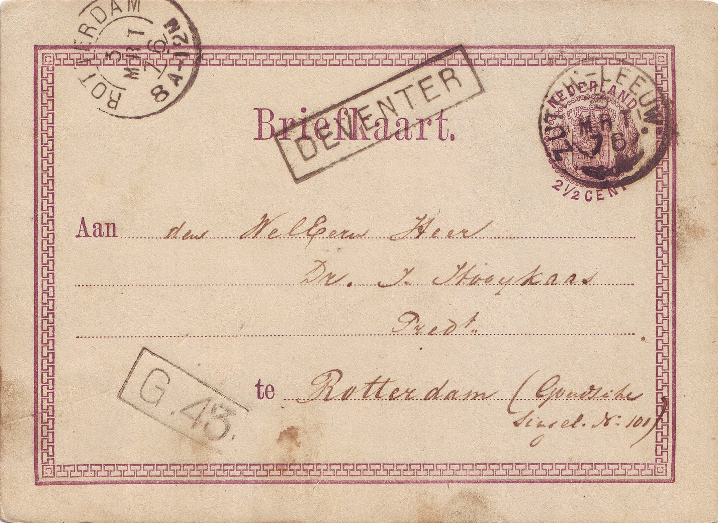 Briefkaart van Deventer naar Rotterdam met haltestempel Deventer, treinstempel Zutphen-Leeuwarden van 3 maart 1876, aankomststempel Rotterdam van dezelfde datum en bestellersstempel G.43